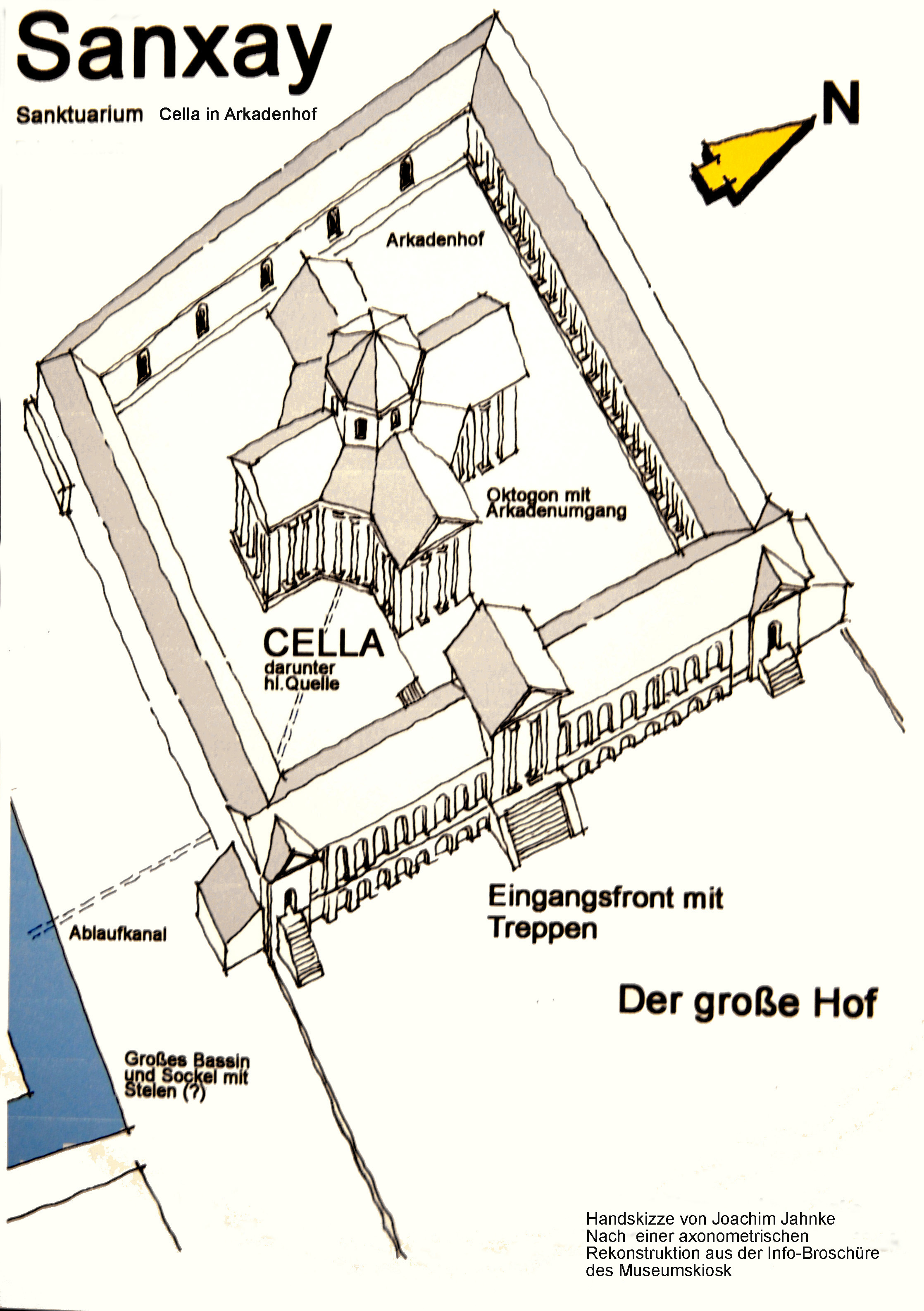 Sanxay, Sanktuarium, Cella in Arkadenhof